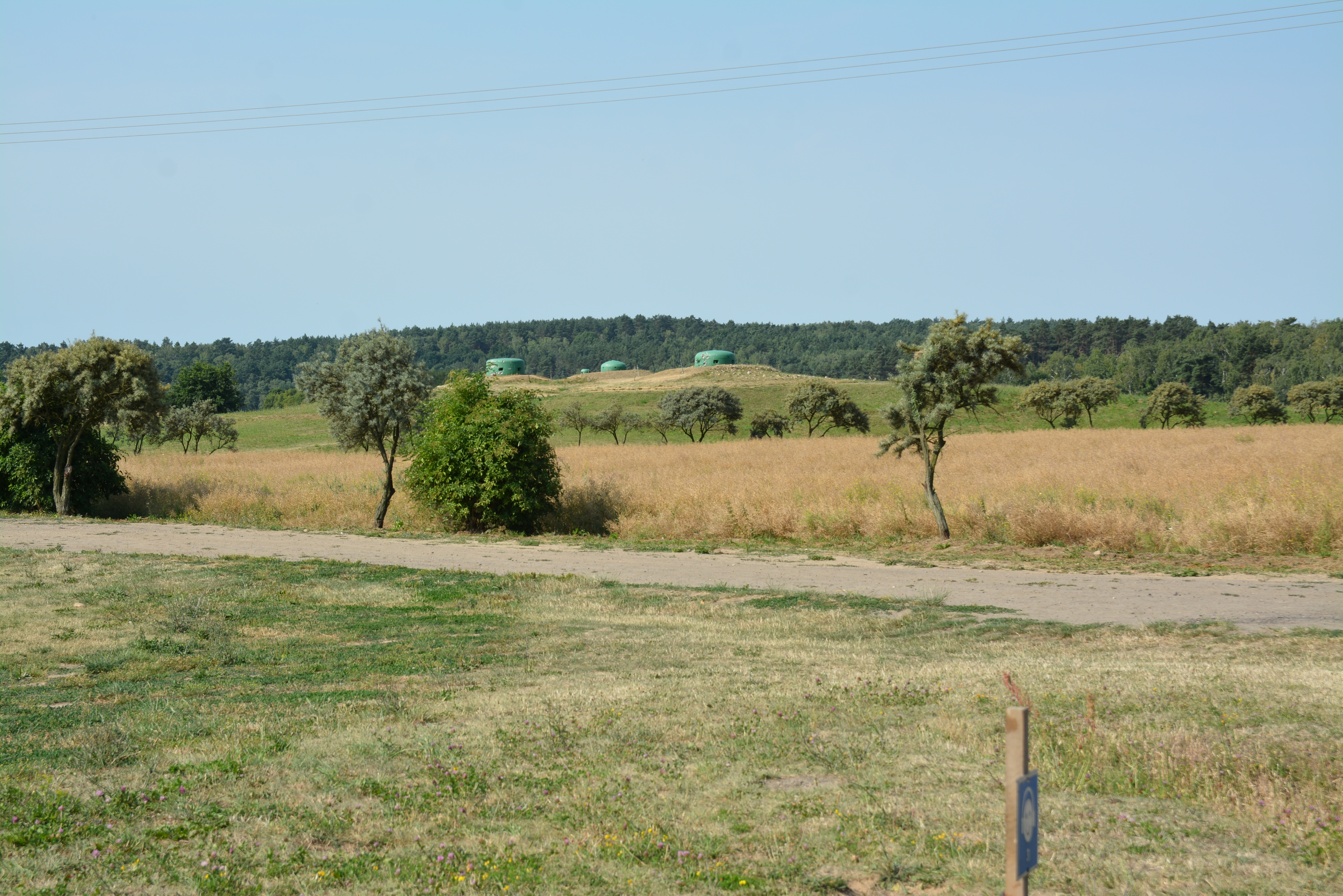 MRU - Muzeum Fortyfikacji i Nietoperzy w Pniewie